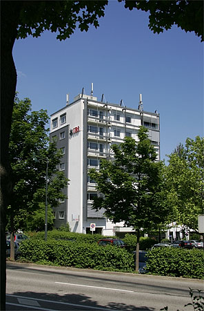 Hochhaus in Oberwil